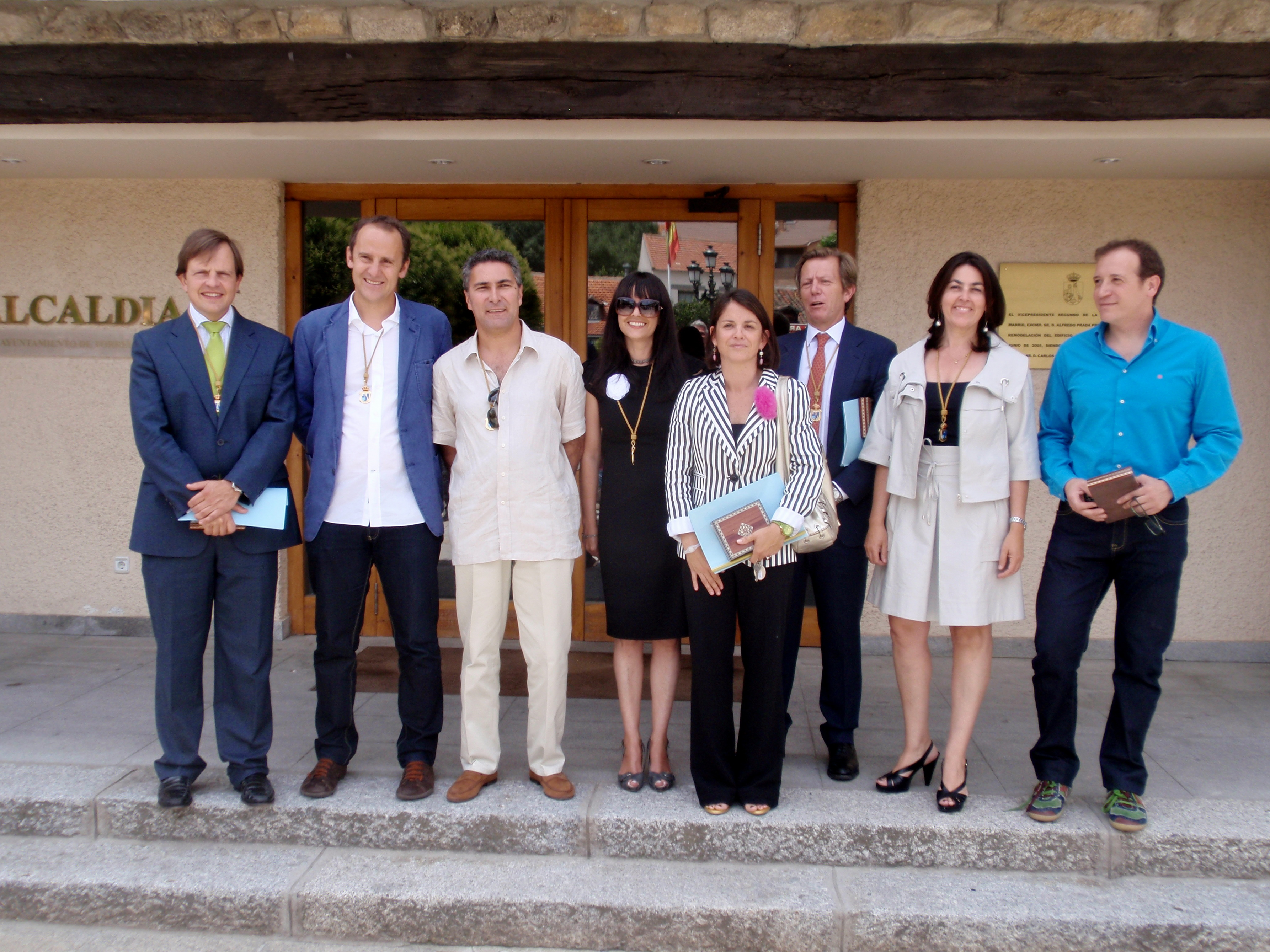 Torrelodones. Ocho de los nueve concejales de Vecinos por Torrelodones frente a la Alcadía el día de investidura (11-06-2011).